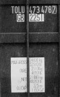 opening container aan beide kanten MAX CROSS eigen gewicht container + maximum gewicht van een lading TARE eigen gewicht container NET maximum gewicht van een lading PAYLOAD maximaal te laden gewicht Vrijgegeven door Afdeling Transport, Logistiek en Organisatie onder goedkeuring van Hans van Ham (promovendus TU Delft).